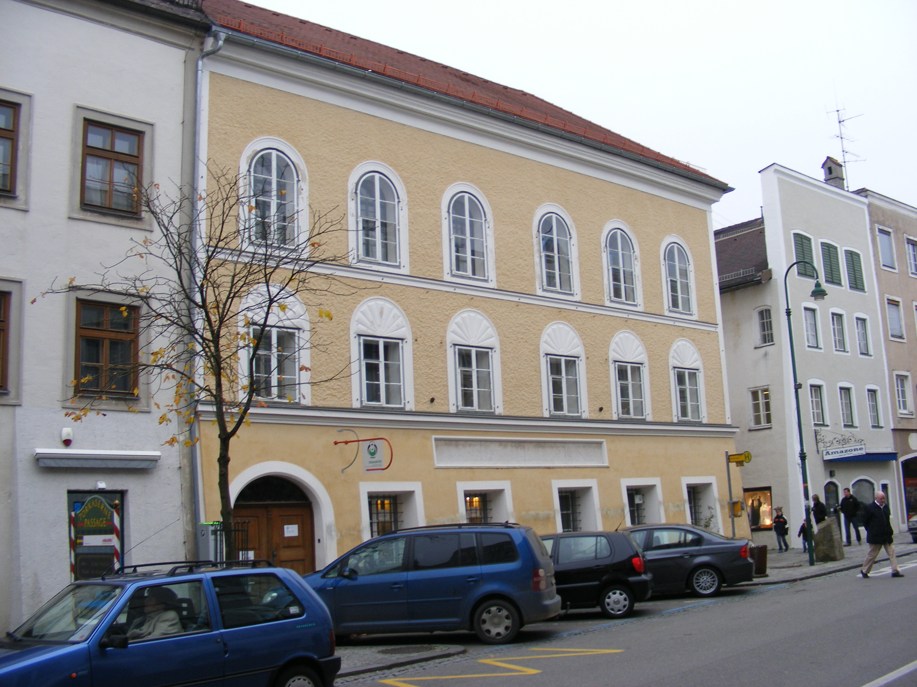 Salzburger Vorstadt 15, Braunau am Inn, Oberösterreich.